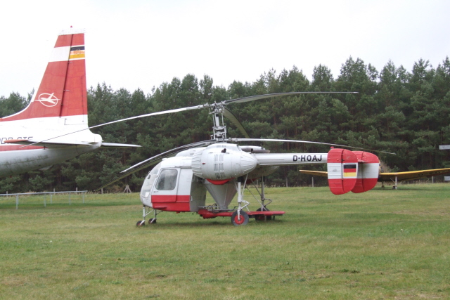 Kamov Ka-26 - Hans-Grade-Museum in Borkheide Fotograf: Harald Rossa Datum: November 2006 Höher aufgelöste Version ist verfügbar